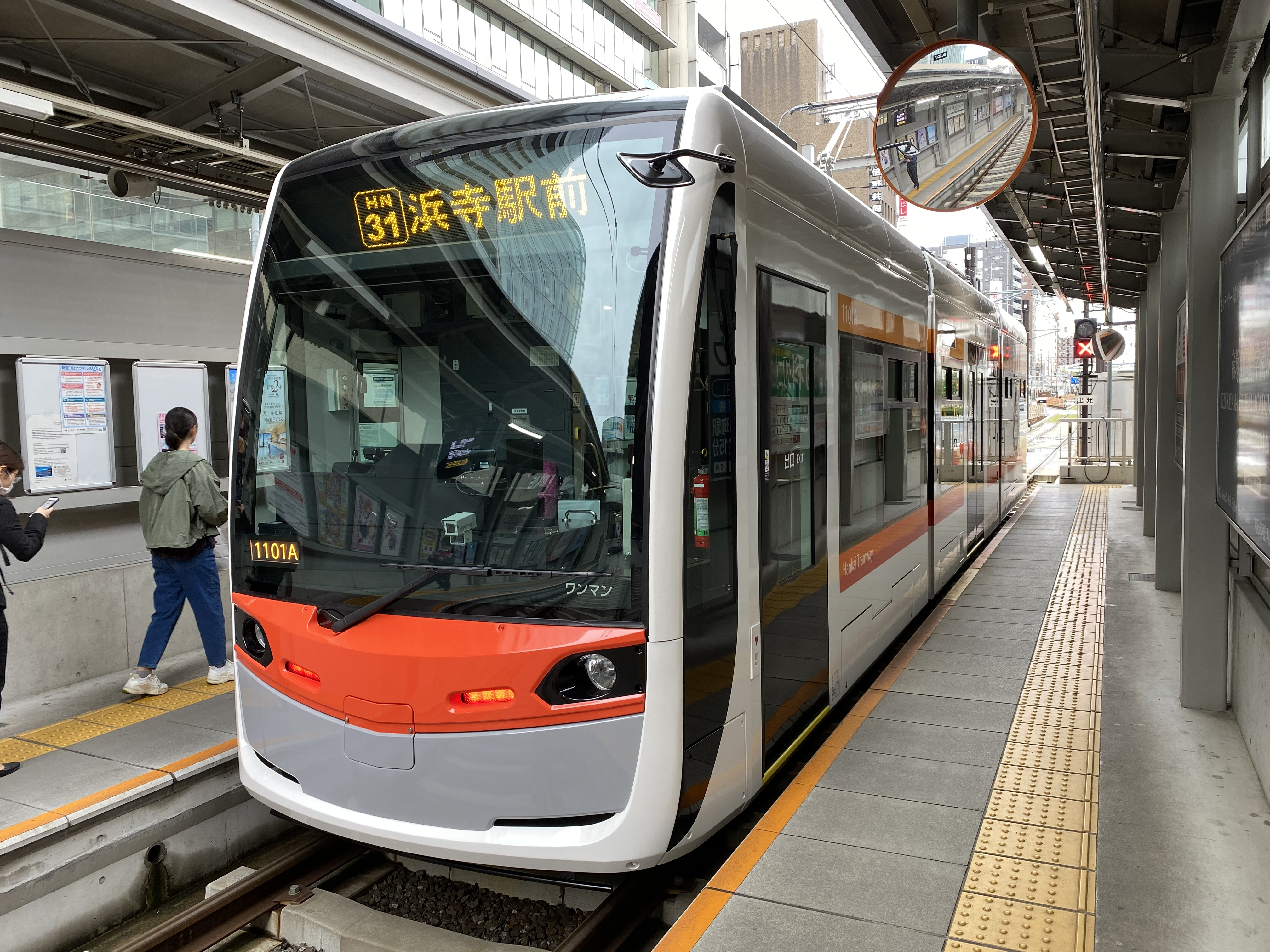 営業運転初日（2020年3月28日）天王寺駅前停留所にて撮影。